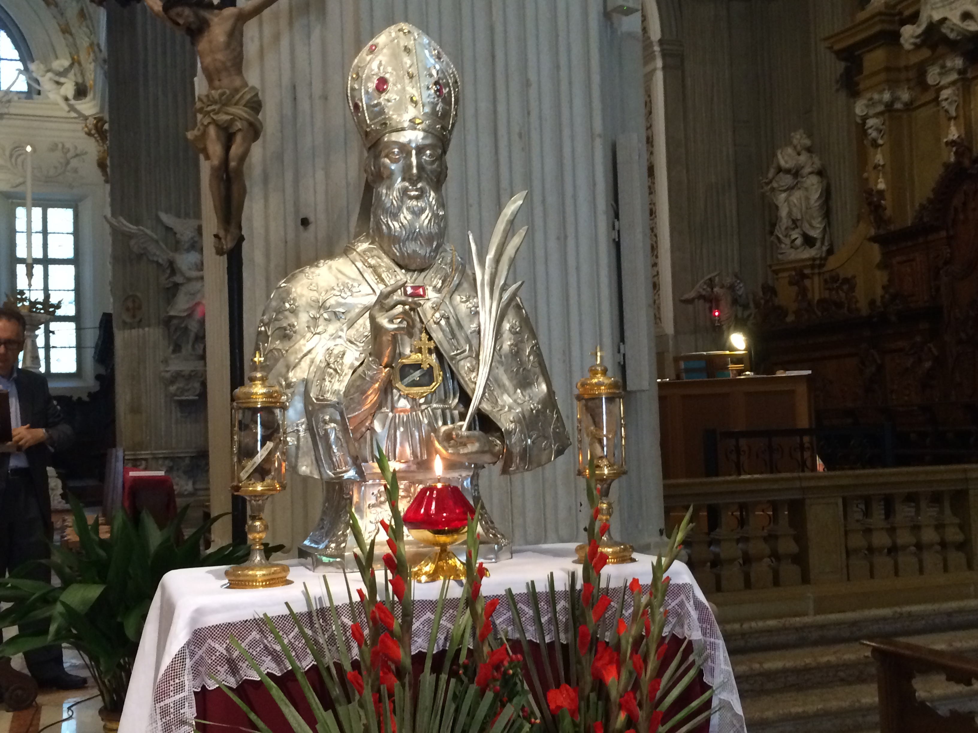 SantErmacora